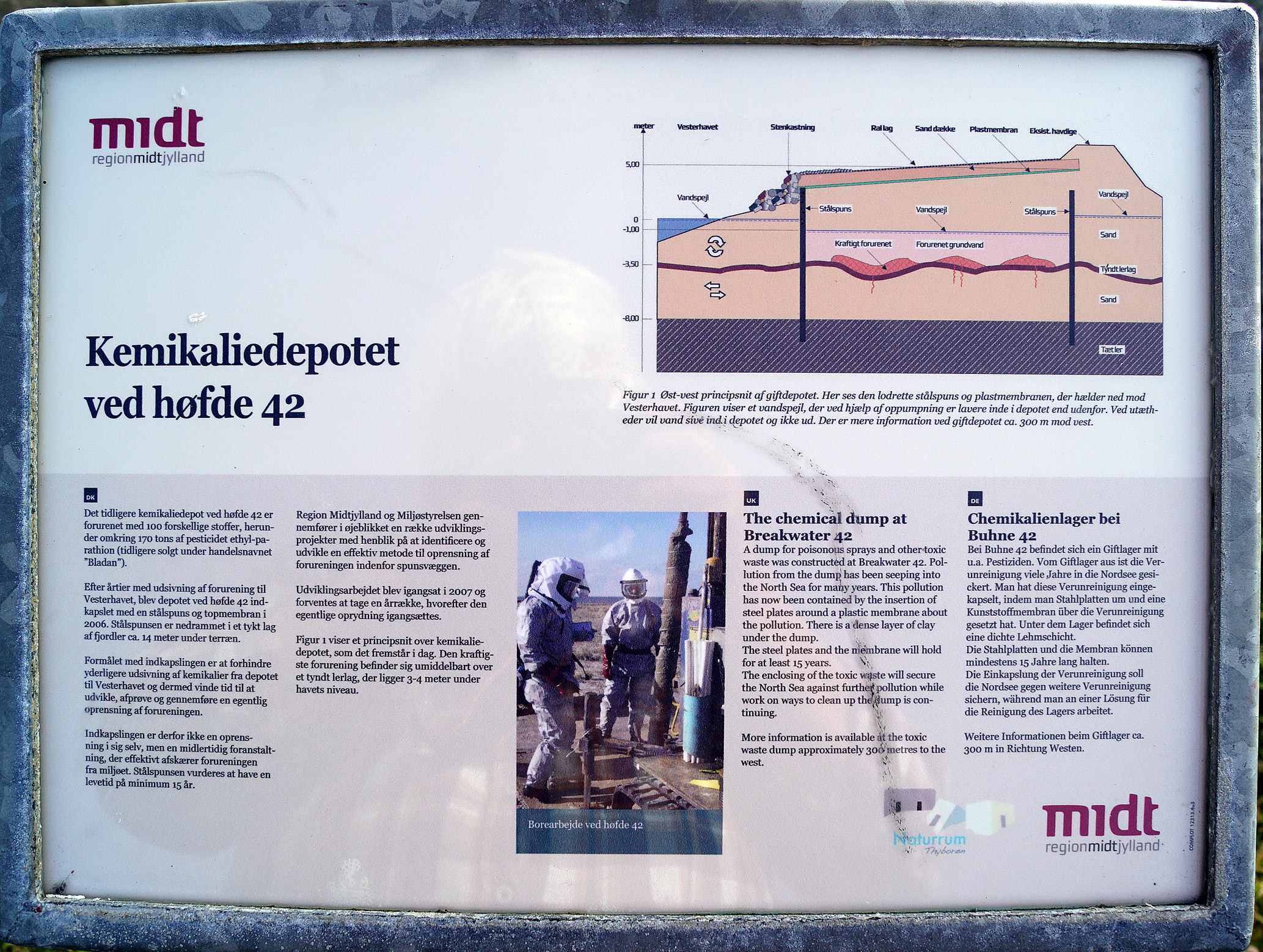 Informationstavle fra Region Midt